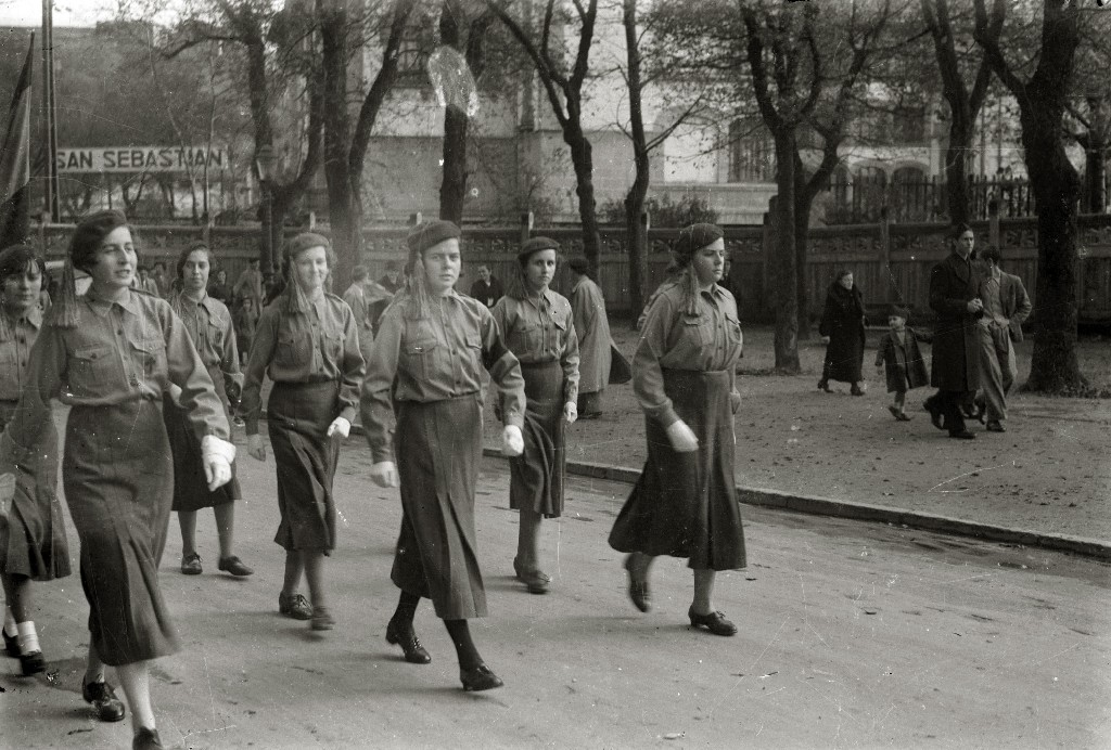 Título original: Preparativos y desfiles militares por la avenida de la Libertad (4/12) Localización: San Sebastián (Guipúzcoa)